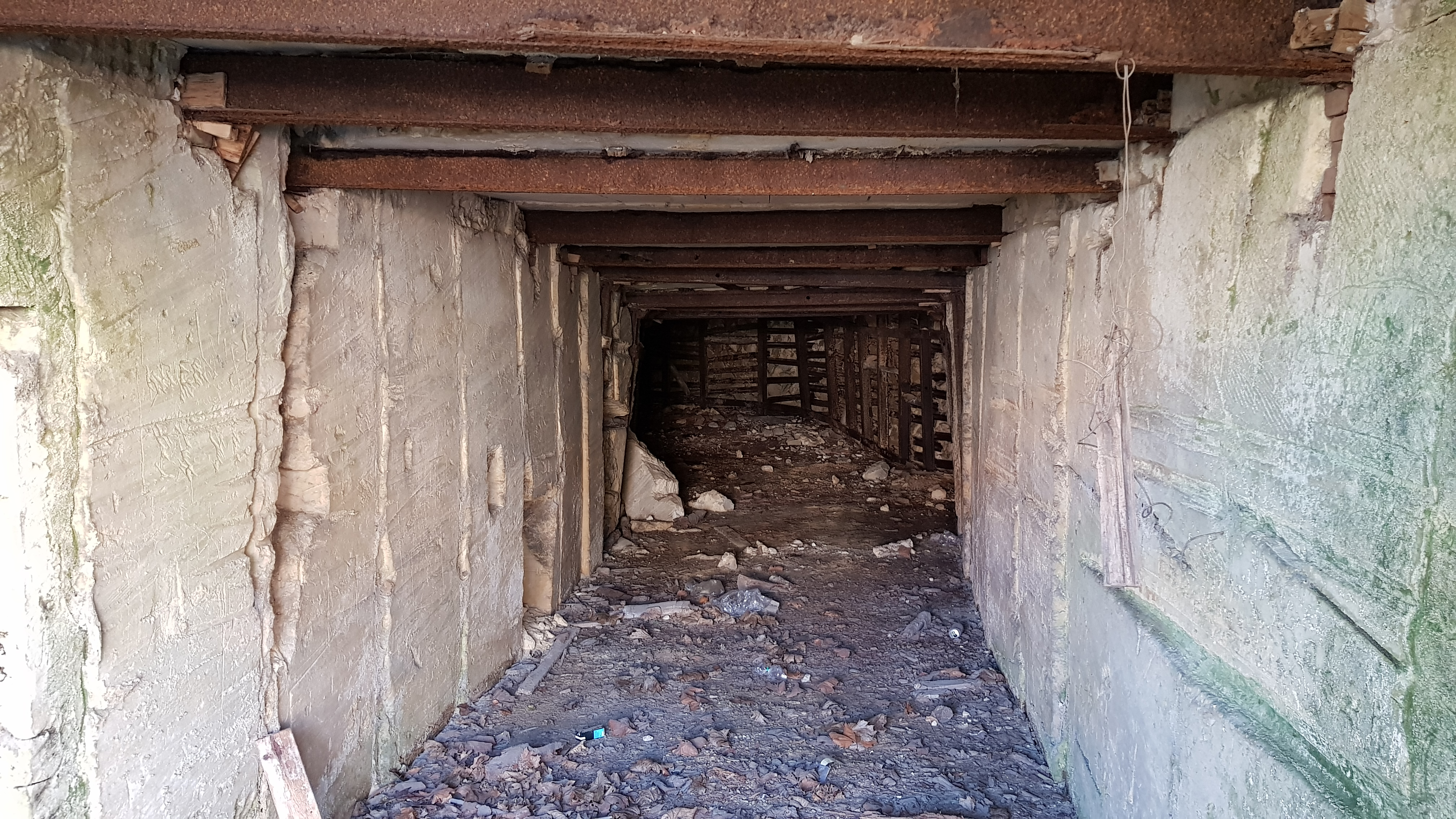 zuidwestelijke ingang van de Proeftunnel Daelhemerweg aan de Daalhemerweg, Valkenburg aan de Geul, Nederland